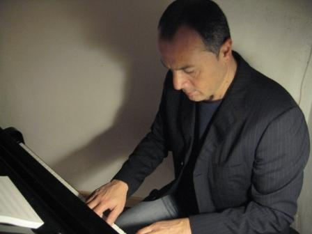 Andrea Ridolfi